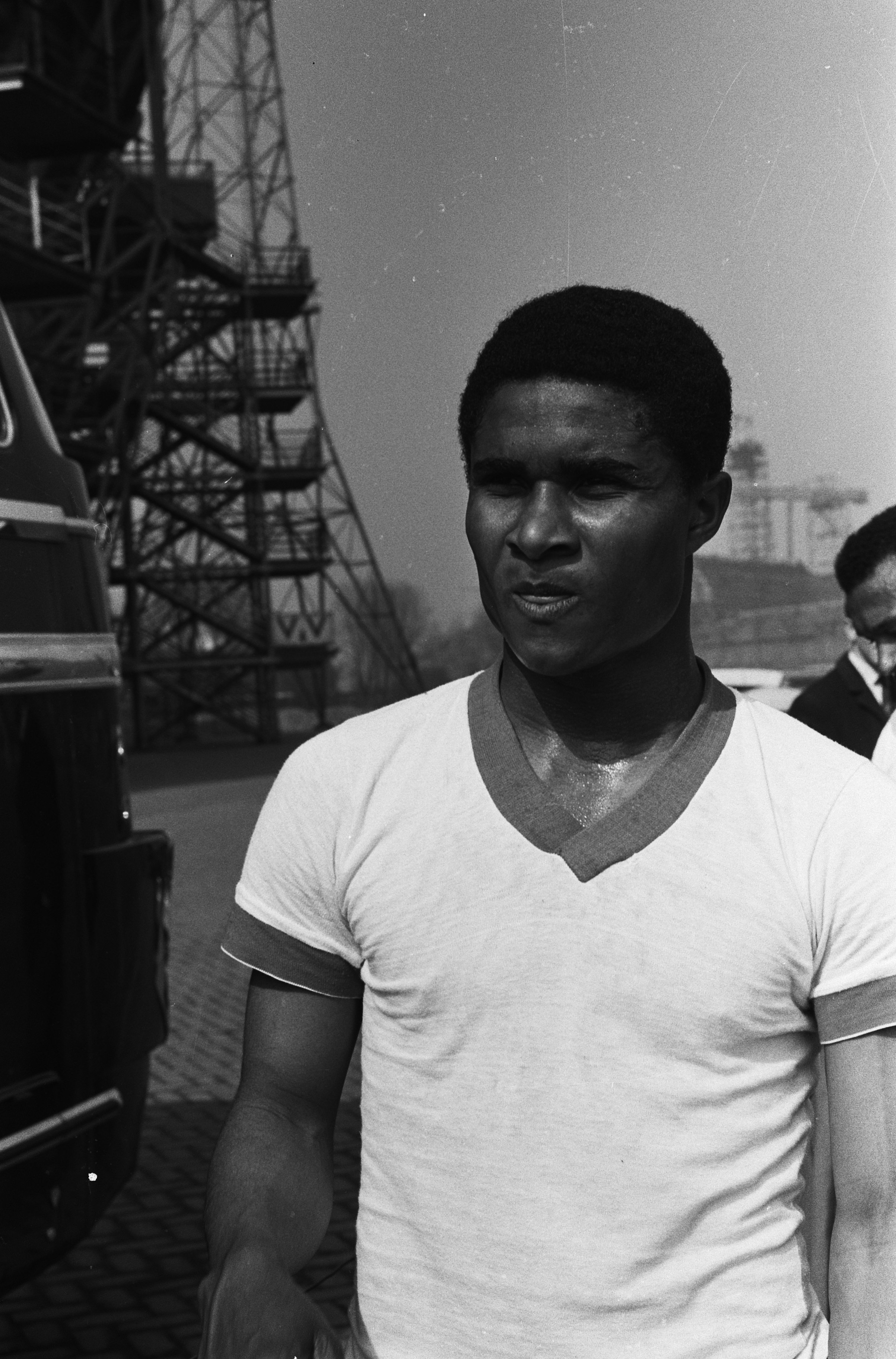 Collectie / Archief : Fotocollectie Anefo Reportage / Serie : [ onbekend ] Beschrijving : Benfica traint op bijvelden Feijenoord, Eusébio Datum : 8 april 1963 Locatie : Rotterdam Trefwoorden : sport, voetbal Persoonsnaam : Eusebio, Eusébio Ferreira da Silva Instellingsnaam : Benfica, Feyenoord Fotograaf : Pot, Harry / Anefo Auteursrechthebbende : Nationaal Archief Materiaalsoort : Negatief (zwart/wit) Nummer archiefinventaris : bekijk toegang 2.24.01.05 Bestanddeelnummer : 915-0217